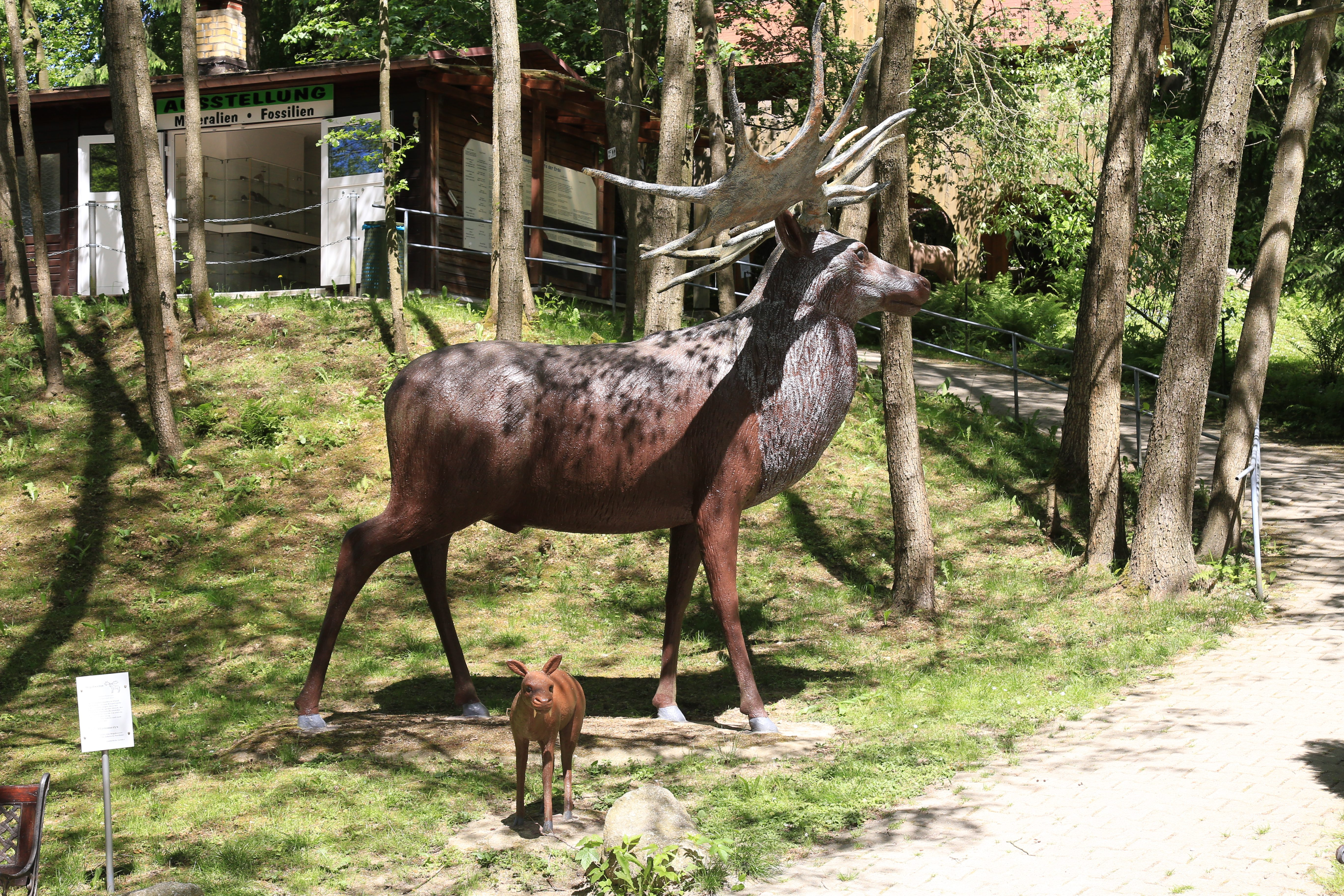 Urzeitpark Sebnitz Mai 2017 (24)